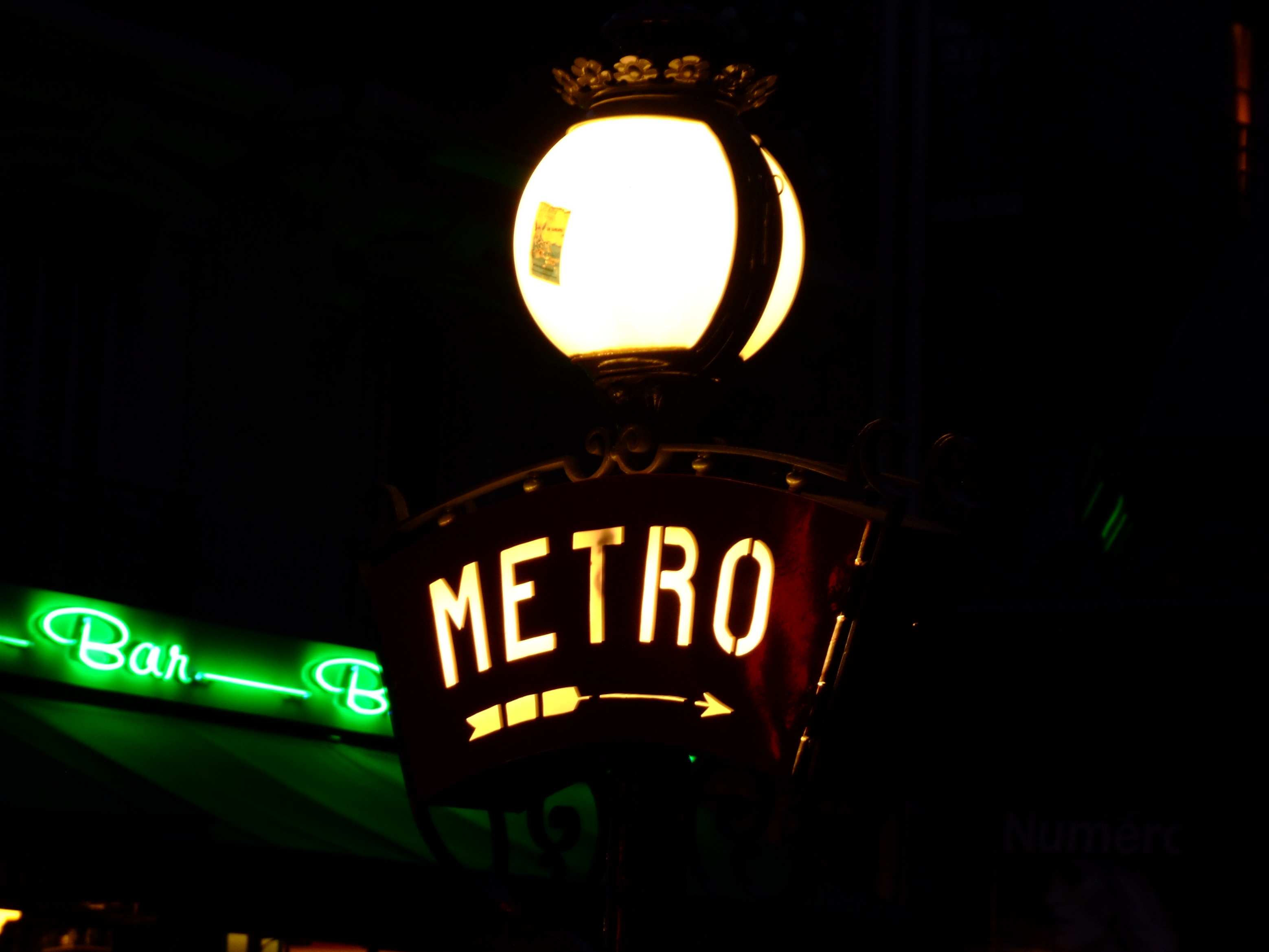 Mat candélabre de l'accès à la station de métro Lamarck - Caulaincourt, Paris, France.